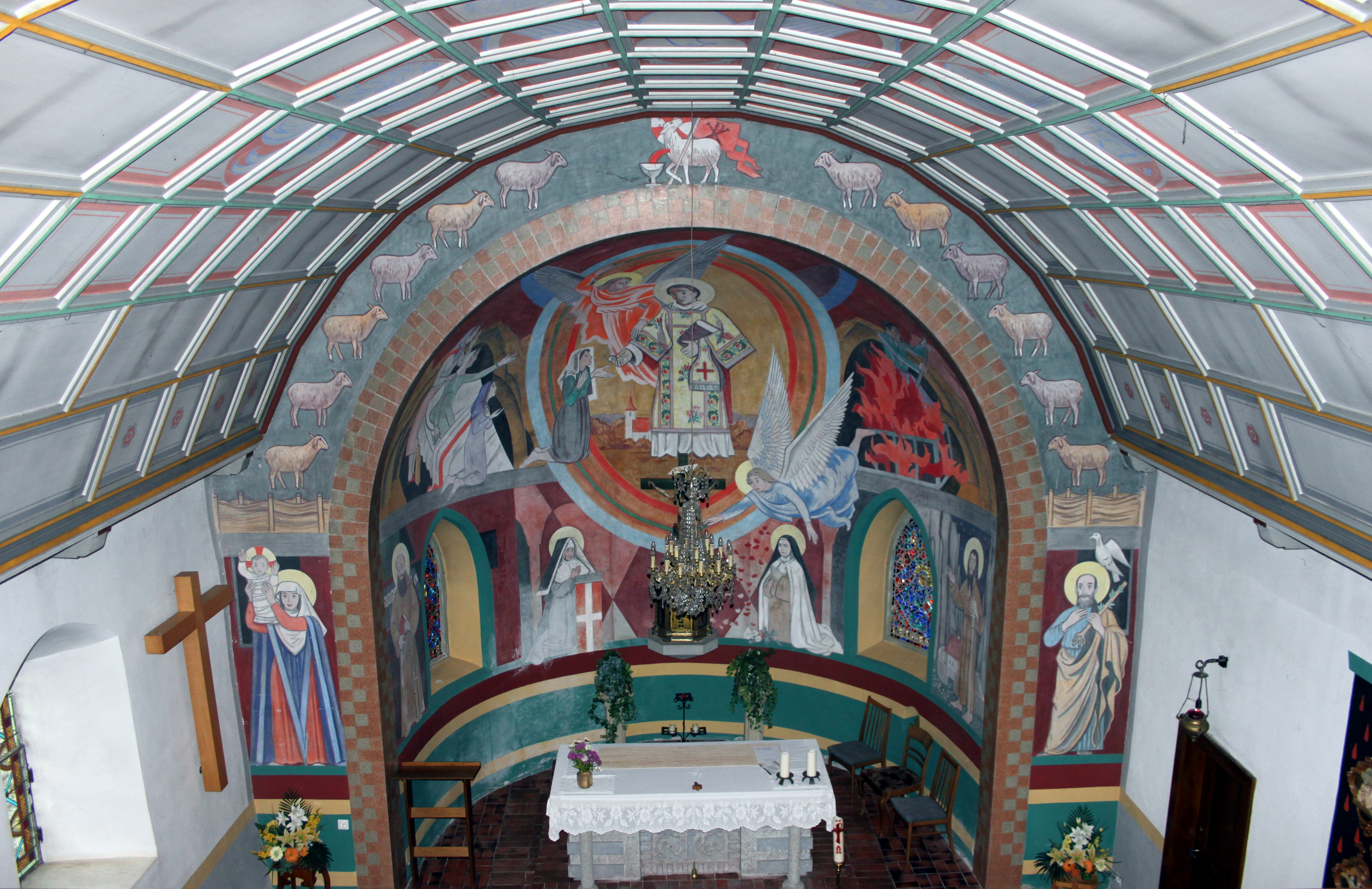 Vue de l'intérieur de la chapelle Saint-Laurent, dans la localité de Rueyres-Saint-Laurent (actuellement commune du Gibloux) en juin 2018